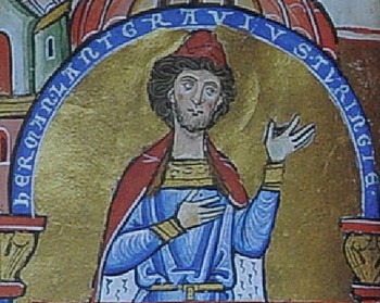 Heřman I. Durynský